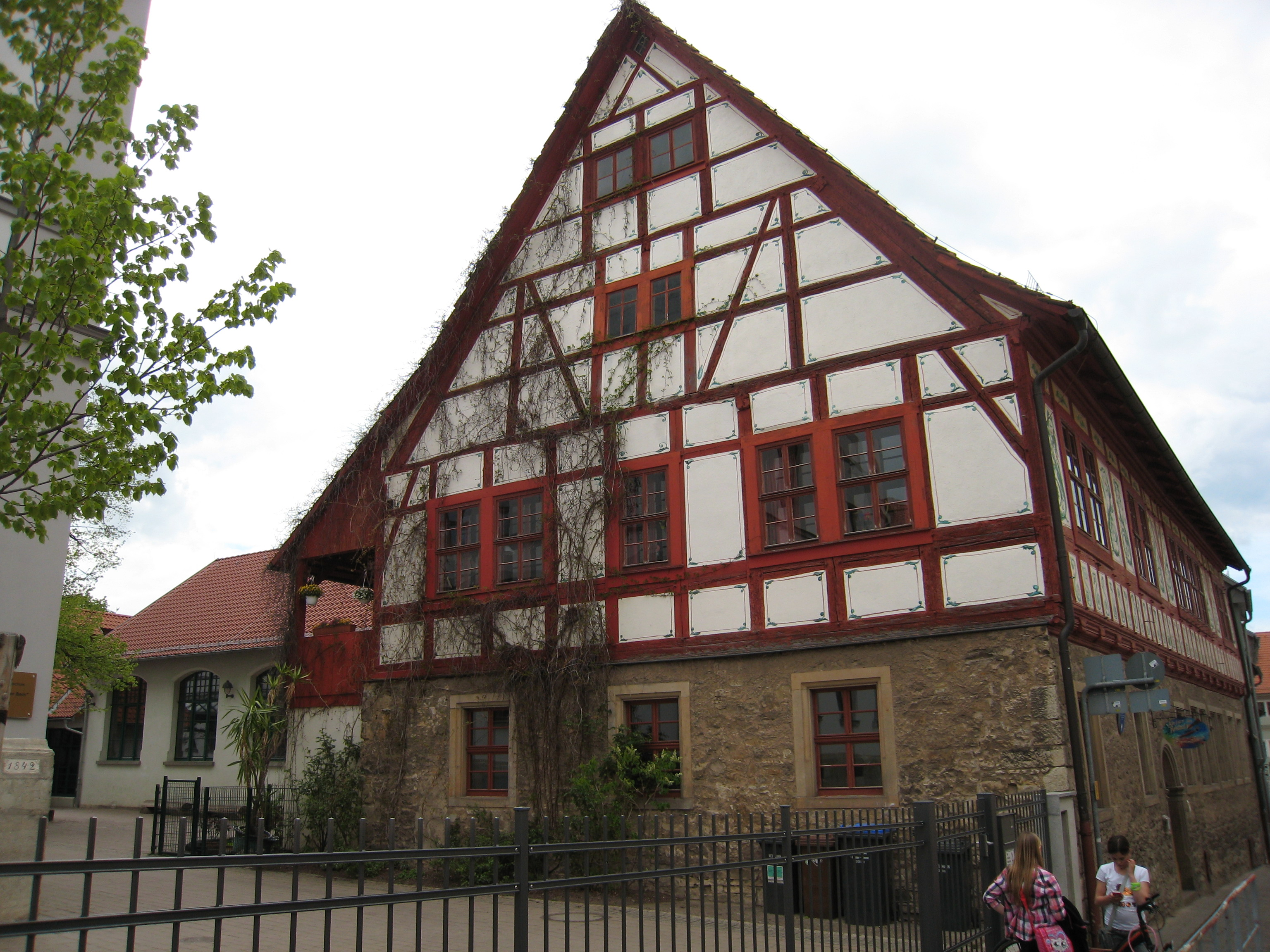 Das Alte Rektorat in Arnstadt (Kohlgasse).